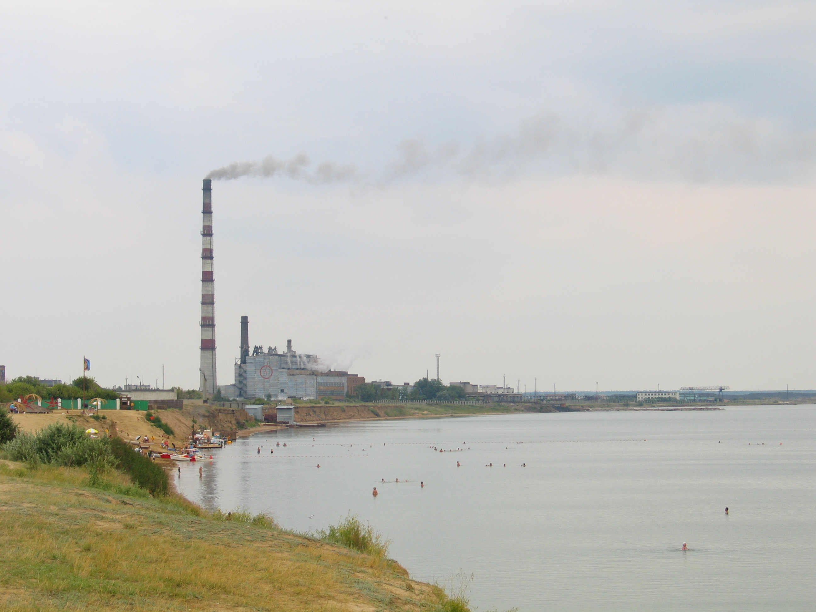 Вид на городской пляж г. Яровое, Большое Яровое озеро и завод ОАО «Алтайхимпром»